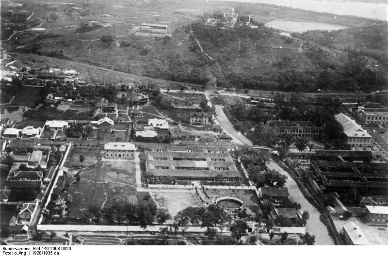 China, Nanking, Landesvermessungsamt und Telegraphenberg (Radiostation)